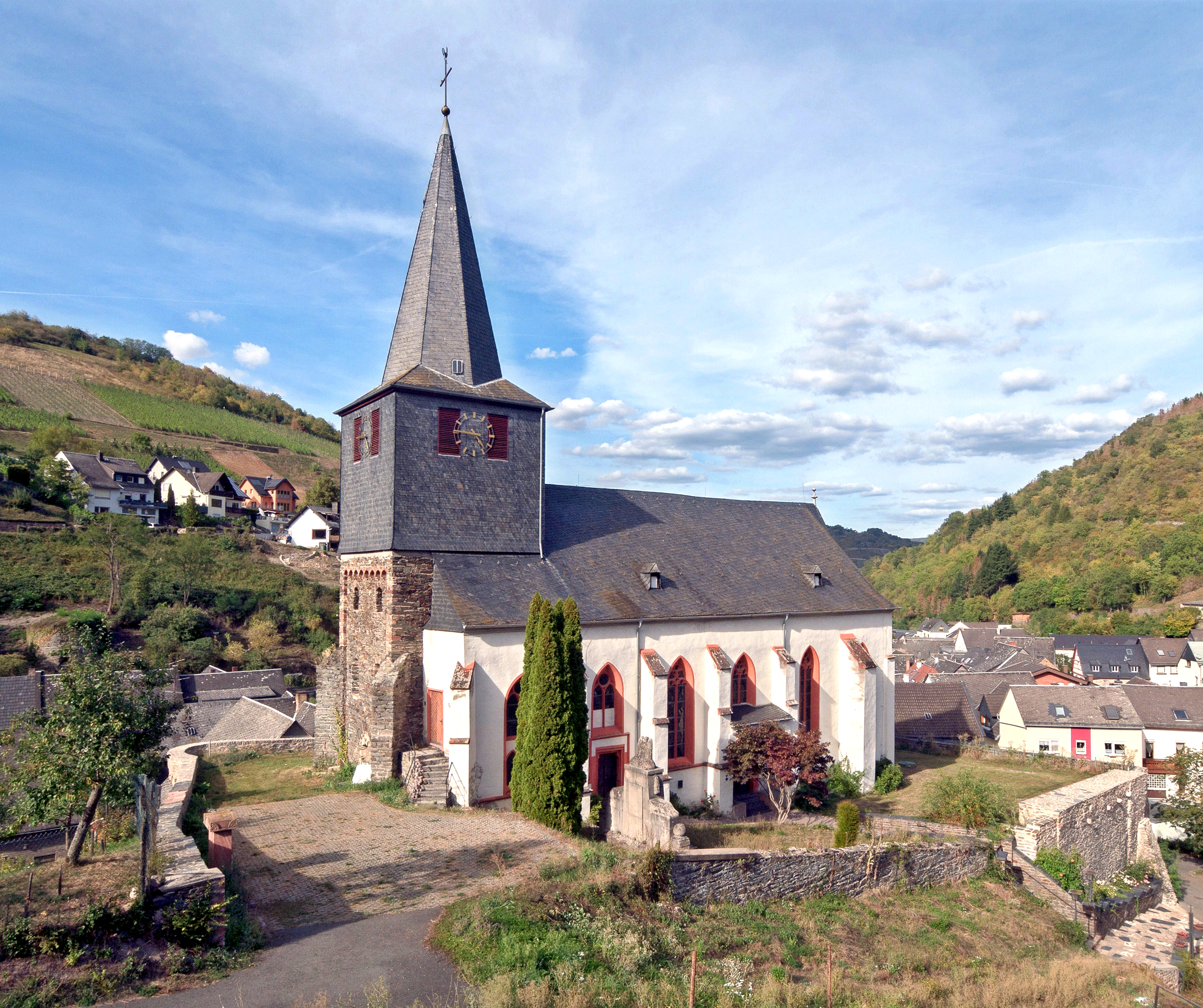 Evangelische Pfarrkirche St. Mauritius. Dreischiffige, gotische Hallenkirche mit älteren romanischen Teilen.